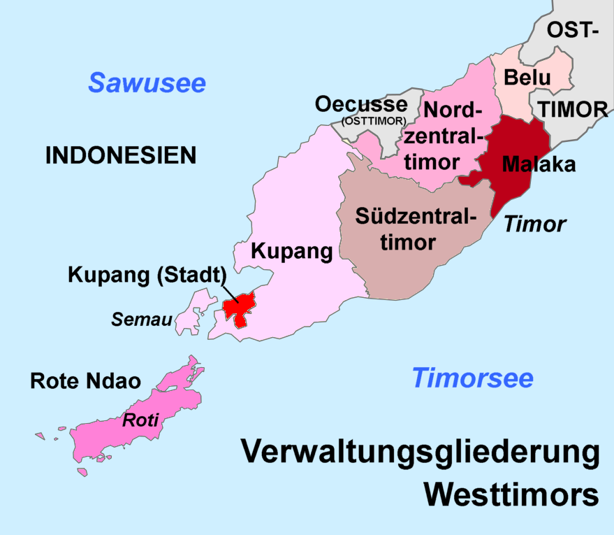 Indonesische Regierungsbezirke auf Roti und in Westtimor